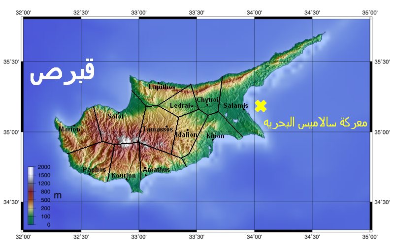 Kaart van Cyprus met een sumiere aanduiding van de voornaamste Chypriotische stadskoninkrijken.